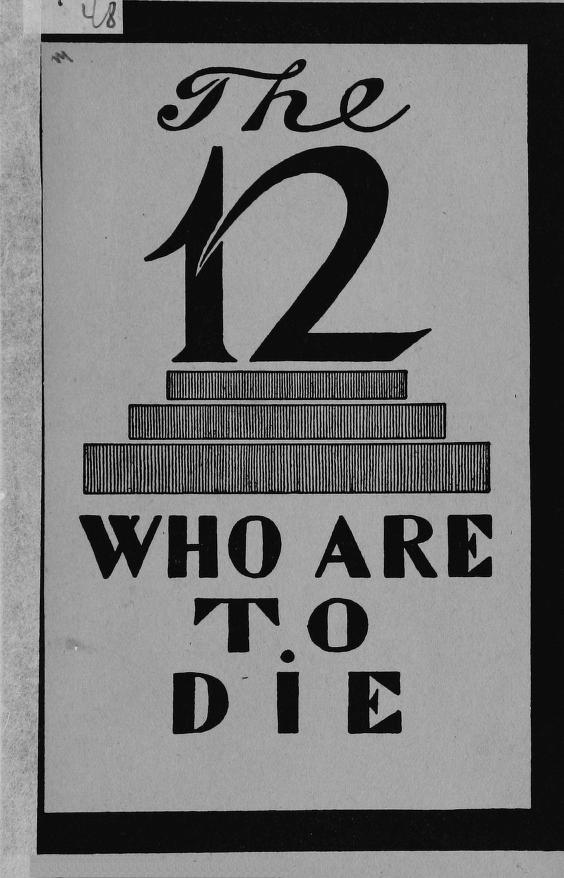 Couverture d'un livre sur le procès des socialistes révolutionnaires de Moscou e 1922 publié à Berlin par la délégation du parti socialiste-révolutionnaire